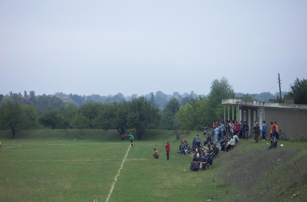 Футболният стадион в село Самуил, България